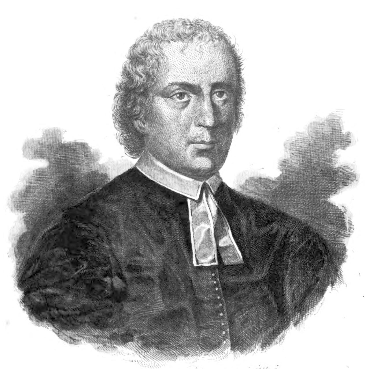 Luigi Angeloni